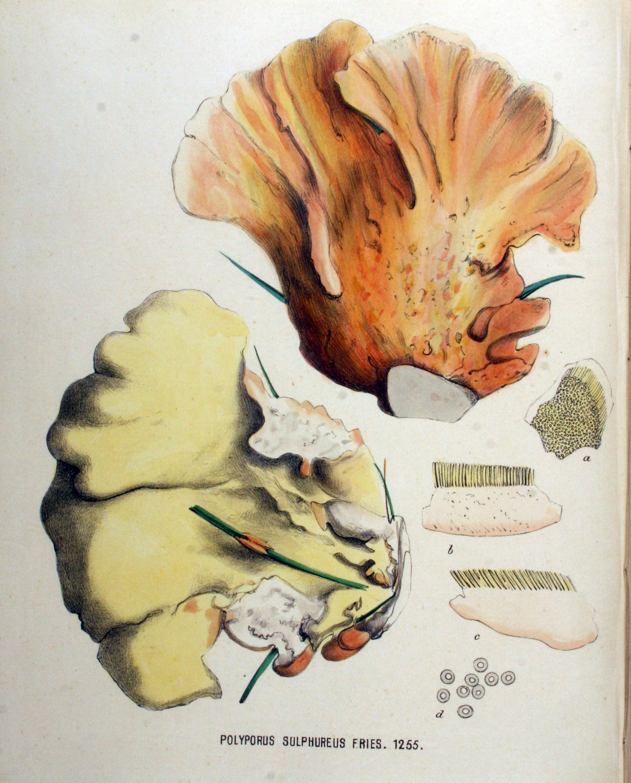 Laetiporus sulphureus syn. Polyporus sulphureus